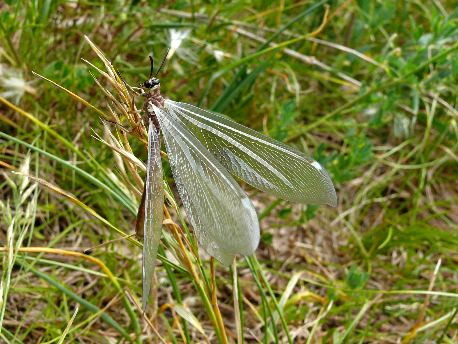 Glaslauterriegel-Heferlberg This media shows the nature reserve in Lower Austria with the ID 19.